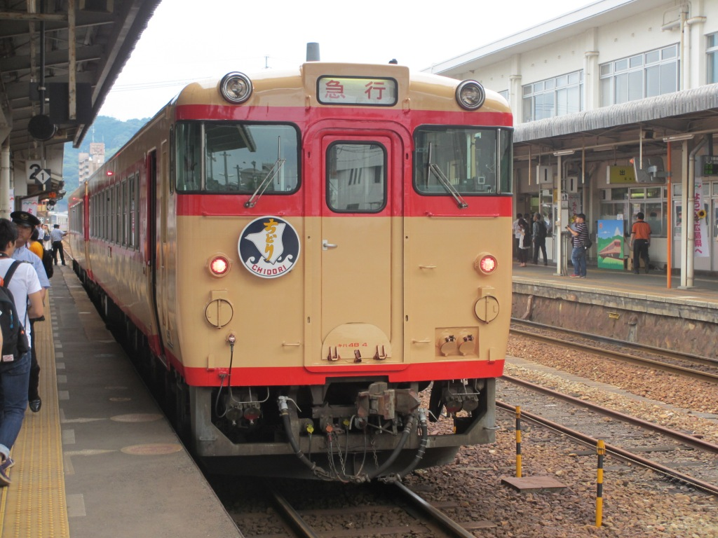 臨時急行ちどり キハ48